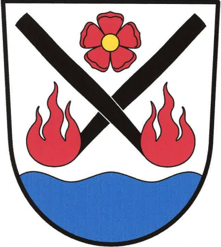 znak, Loučovice, okres Český Krumlov